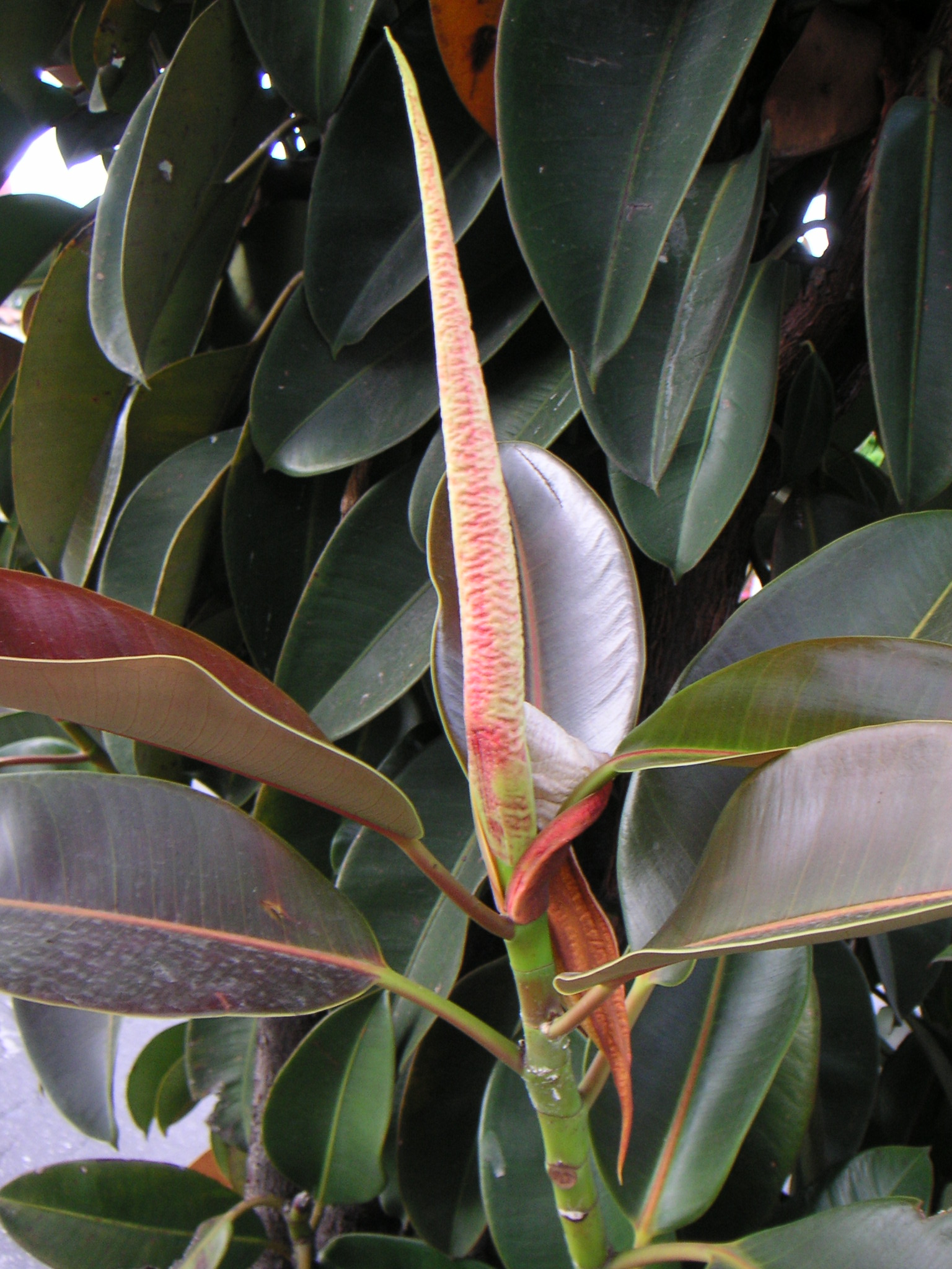 Species Ficus elastica Genus Ficus Familia Moraceae Location Bogotá, Colombia